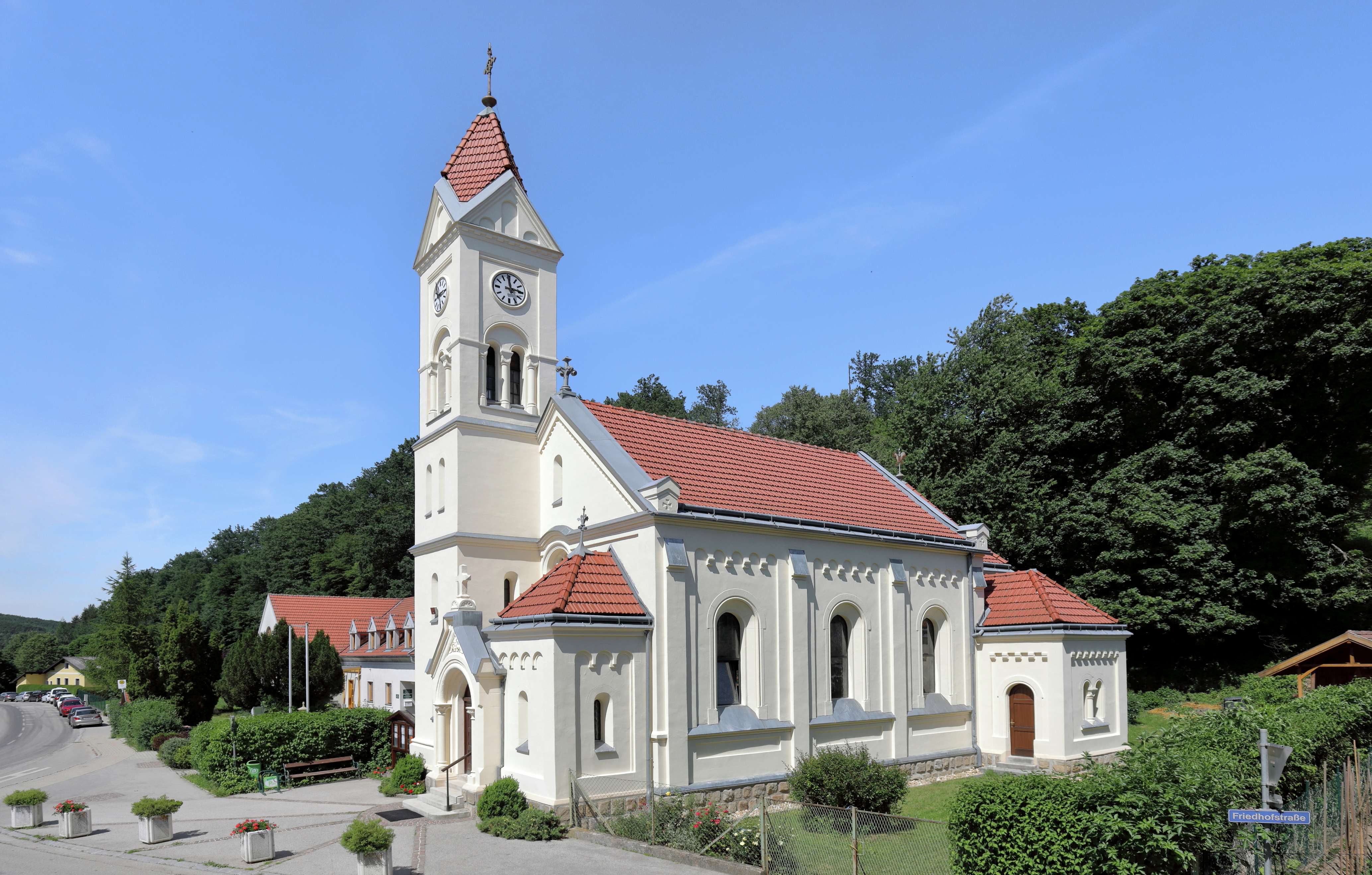 Südwestansicht der röm.-kath. Pfarrkirche Herz Jesu in der niederösterreichischen Gemeinde Wolfsgraben.Baubeginn war 1898. Aus finanziellen Gründen wurde der Bau eingestellt und erst 1907 durch den Orden der Kalasantiner mit Stadtbaumeister Johann Kernast fertiggestellt und geweiht. Die Saalkirche mit neoromanischen Formen hat einen eingezogenen Chor mit 5/8-Schluss sowie einen vorgestellten Nordwest-Fassadenturm.